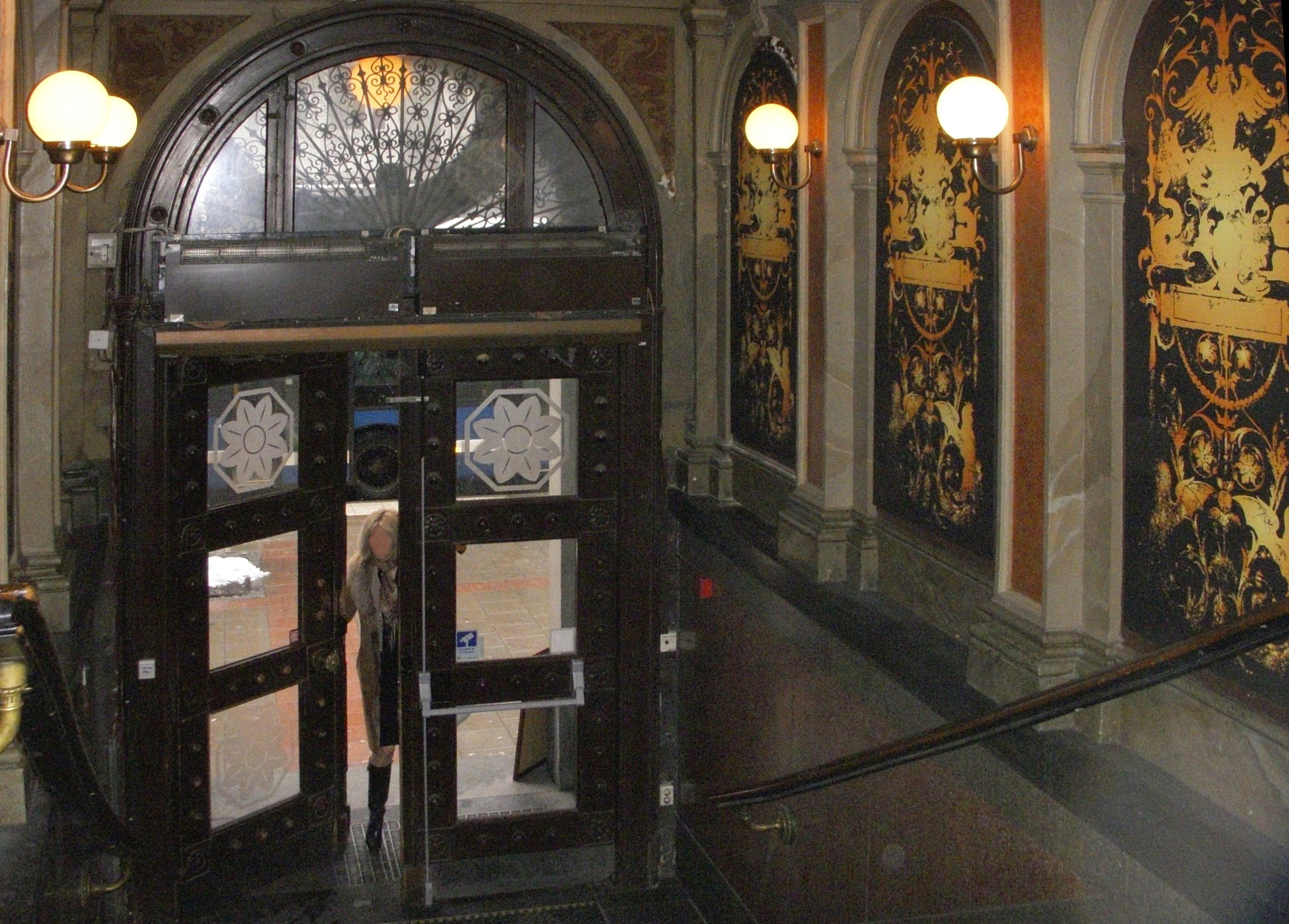 Entrétrappa till Sturecompagniet i Stockholm